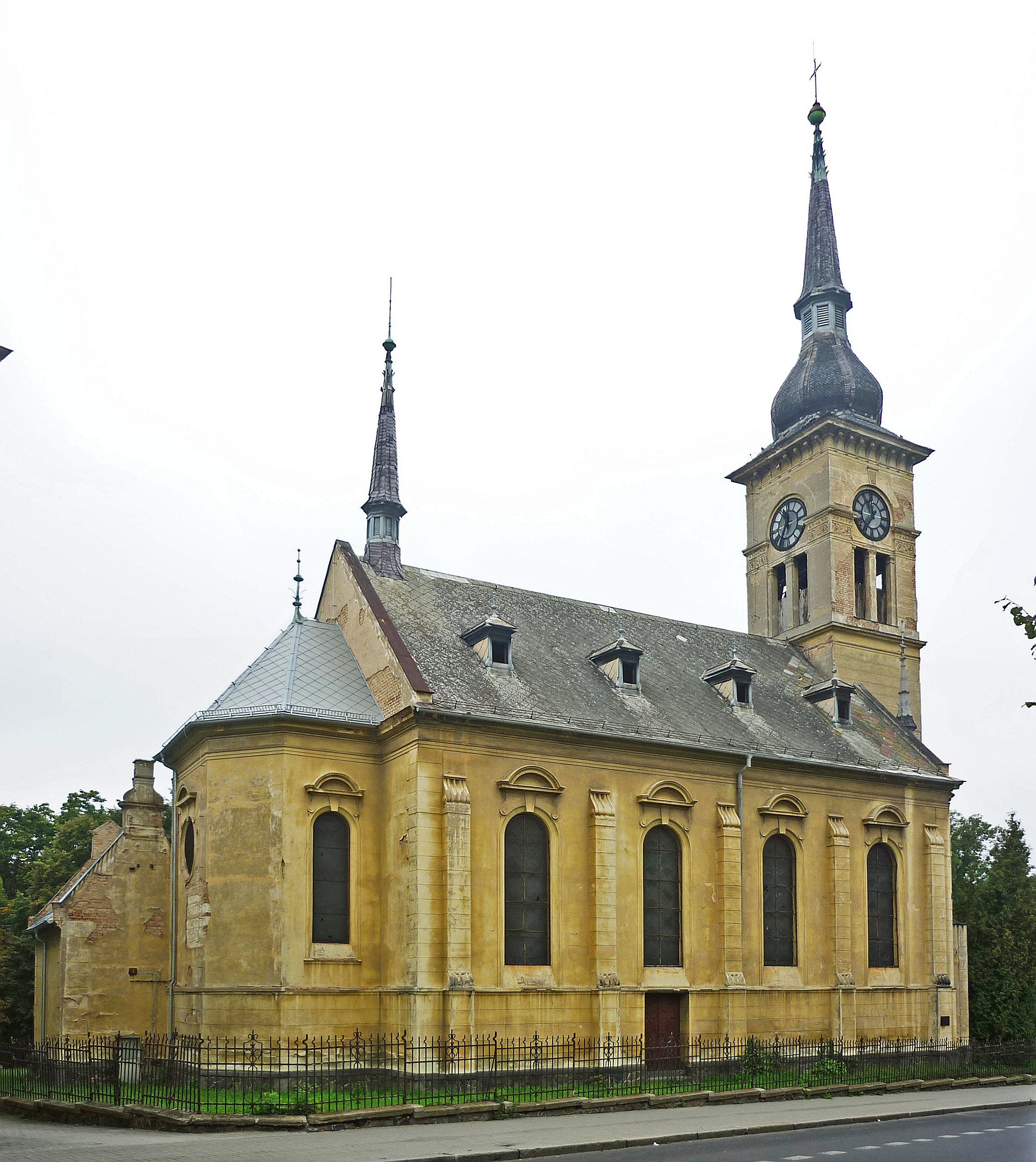 Evangelische Christuskirche Saaz